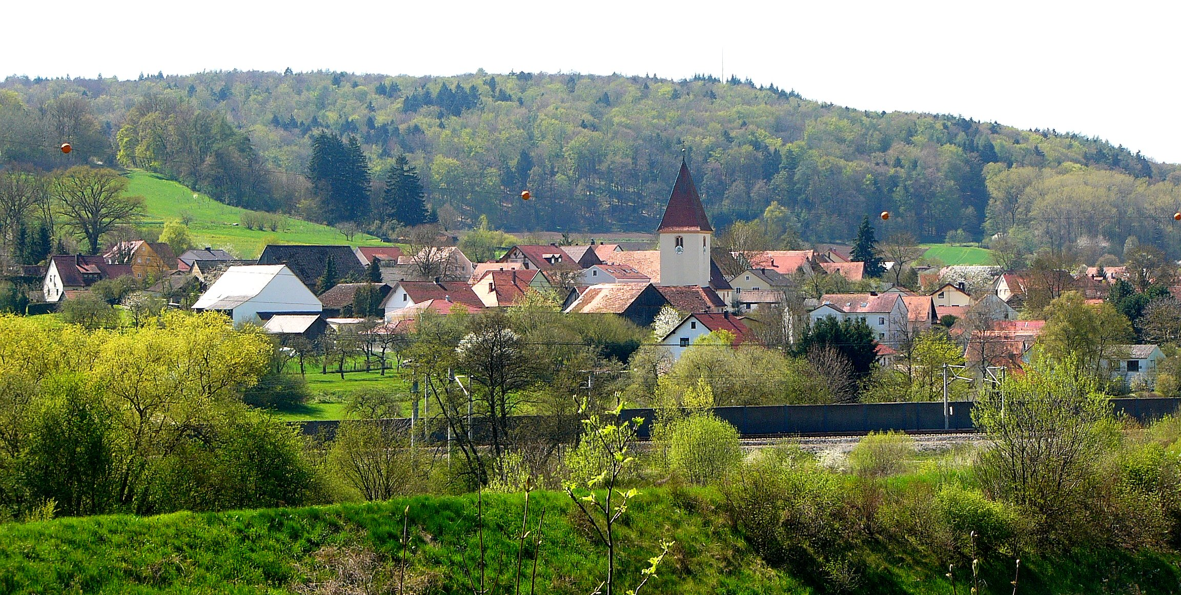 Blick auf Großhöbing, Ortsteil von Greding.